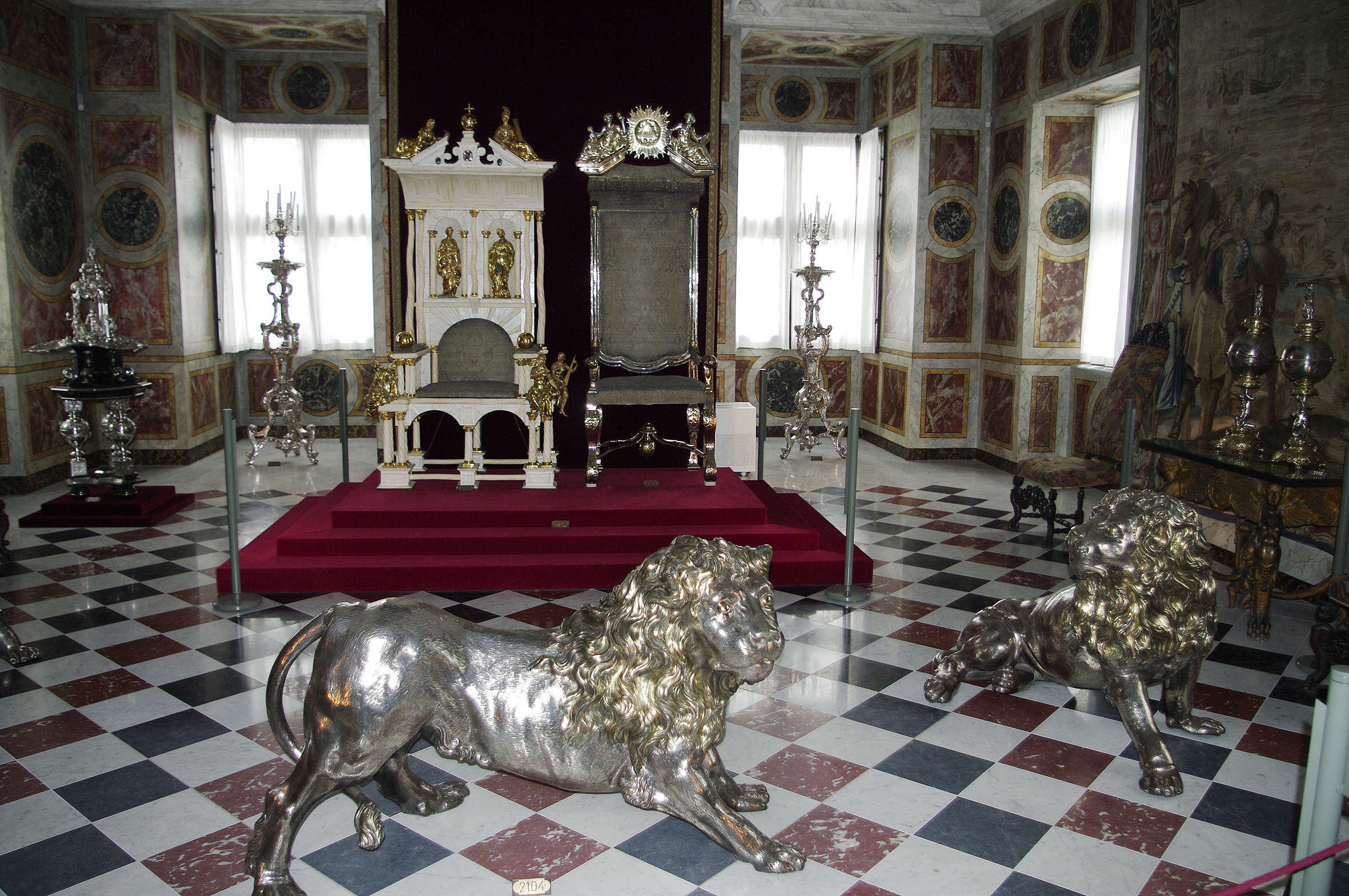 The Knights Hall at Rosenborg Castle.